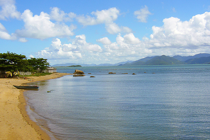 Ribeirão da Ilha Florianópolis - Santa Catarina - Brasil Autor: André Sant'Anna